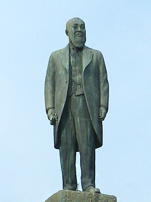 山口県宇部市。渡辺翁記念公園内の渡辺祐策像。